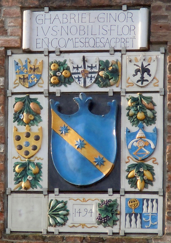 L'arma del podestà Gabriele Ginori sulla Torre del podestà verso Piazza Broletto. La Società per il Palazzo Ducale di Mantova, fondata nel 1902, ha ricollocato sulla torre del Palazzo del Podestà la copia della Targa Ginori dei della Robbia. Cf.